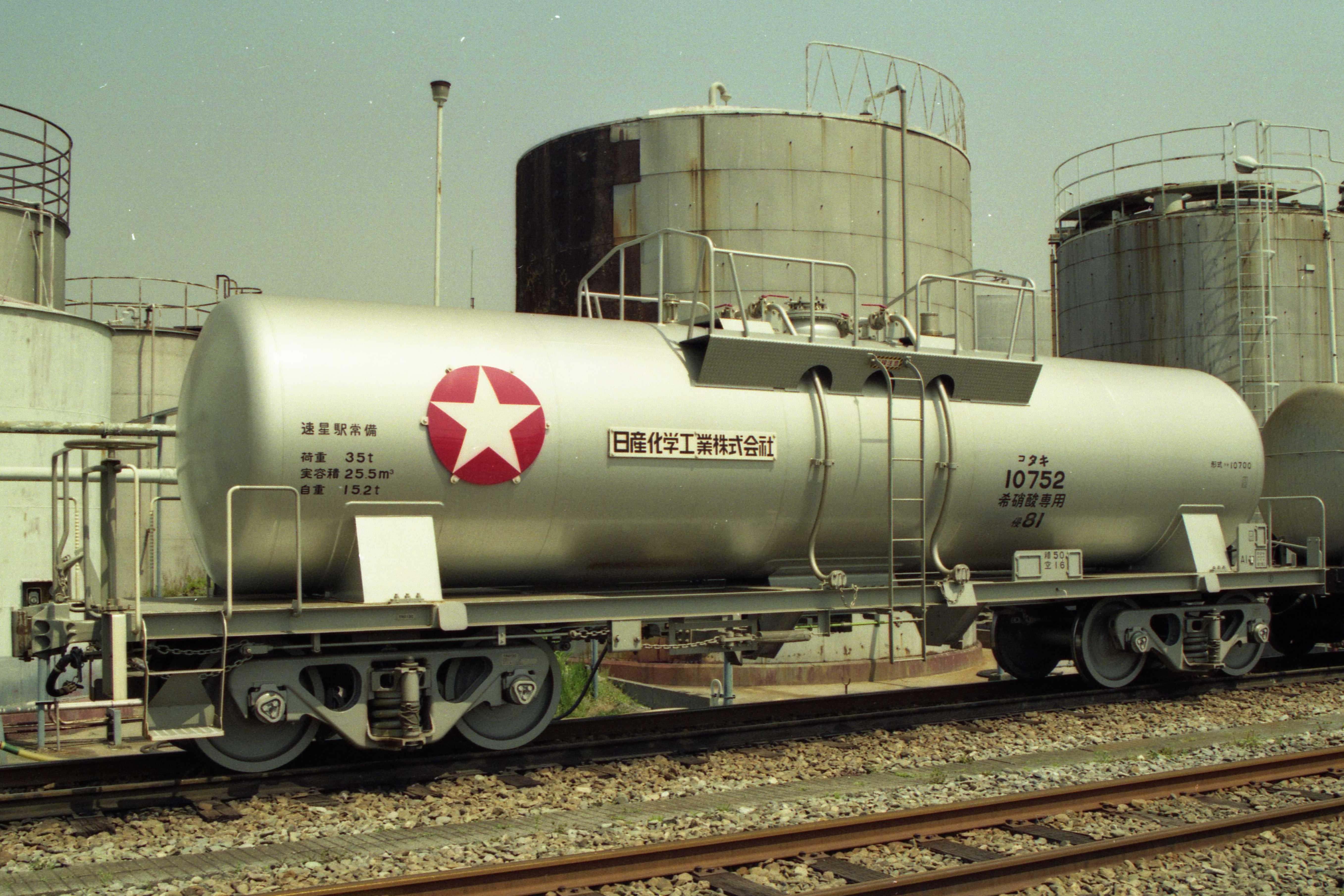 タキ10700形タキ10752。日産化学工業所有。